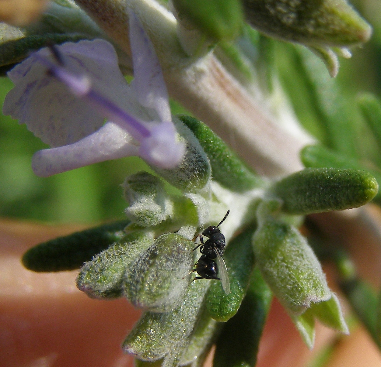 Cette femelle Eurytoma salvicola Zerova, 2003 était en train de pondre dans une larve de Oxyaciura tibialis (Tephritidae) se développant dans un bouton floral de Romarin. Identification: Pr. Zerova (voir Zerova, M. D., & Seryogina, L. Y. (2013). New data on trophic associations and distribution of the eurytomid genera Eurytoma Illiger and Systole Walker (Hymenoptera, Chalcidoidea: Eurytomidae). Entomological review, 93(7), 920-924.